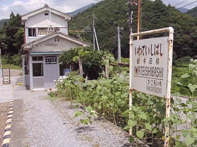 岩手開発鉄道 岩手石橋駅